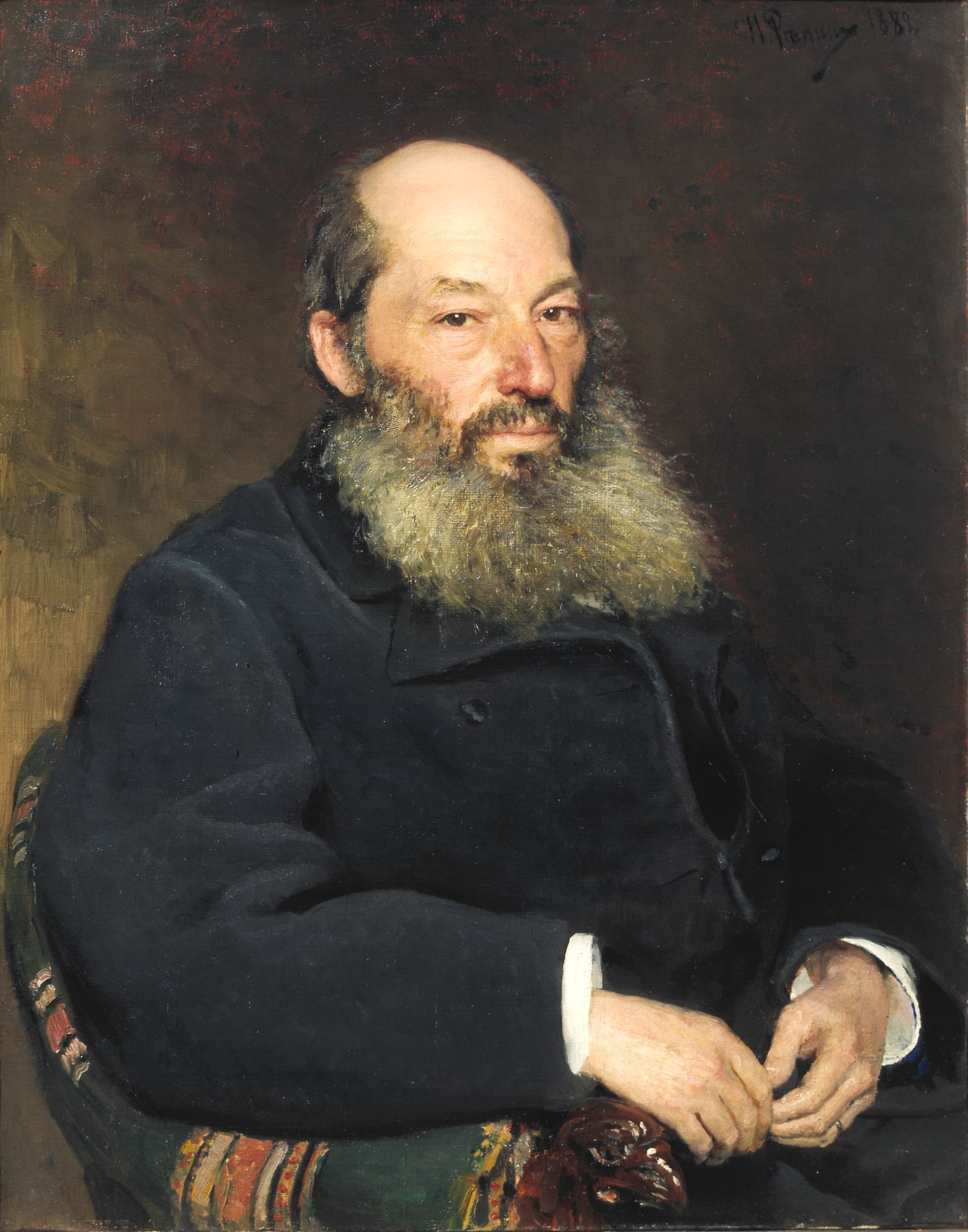 Portrait of poet Afanasy Afanasievich Fet.